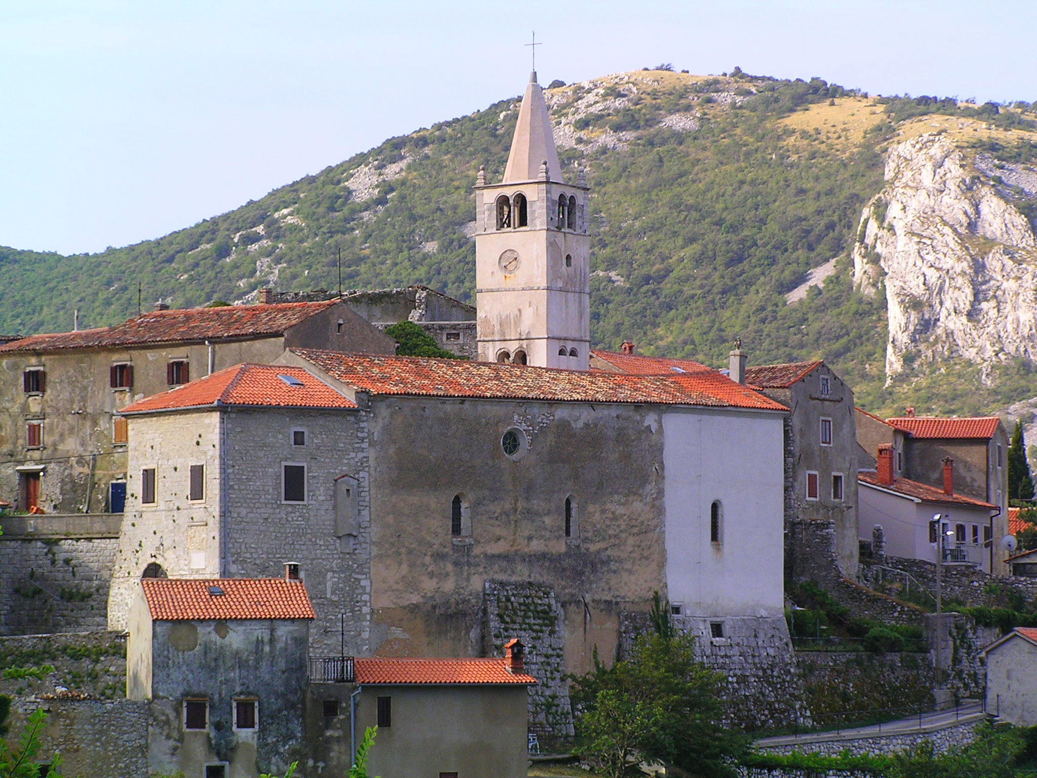 Plomin